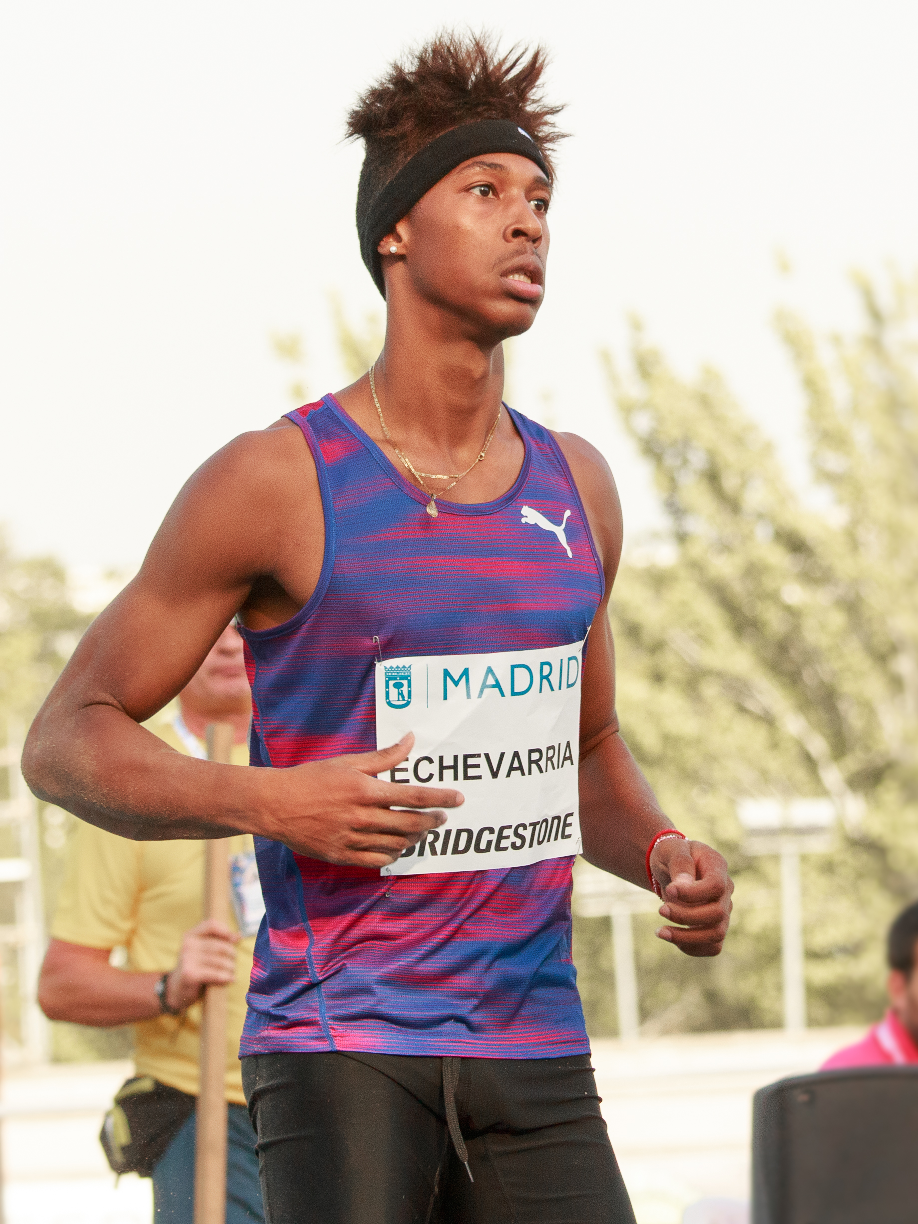 Juan Miguel Echevarría (CUB). Salto en largo. IAAF World Challenge. Meeting Madrid 2017. Moratalaz, Madrid.